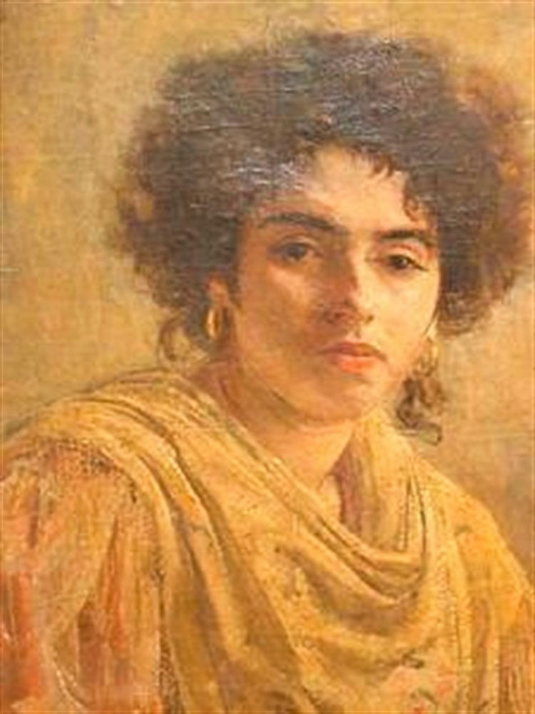 Zelfportret van Corrie Boellaard